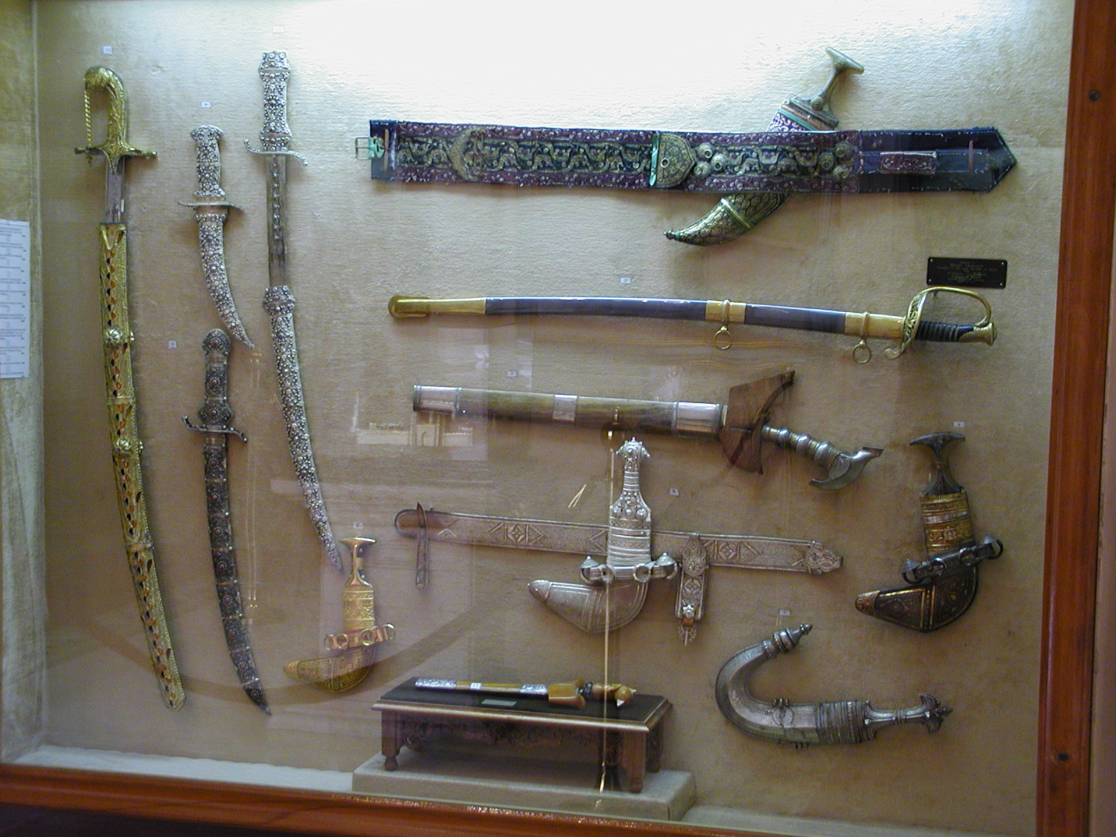 Armes d'apparat au Musée du Palais d'Abedin, Le Caire, Égypte.